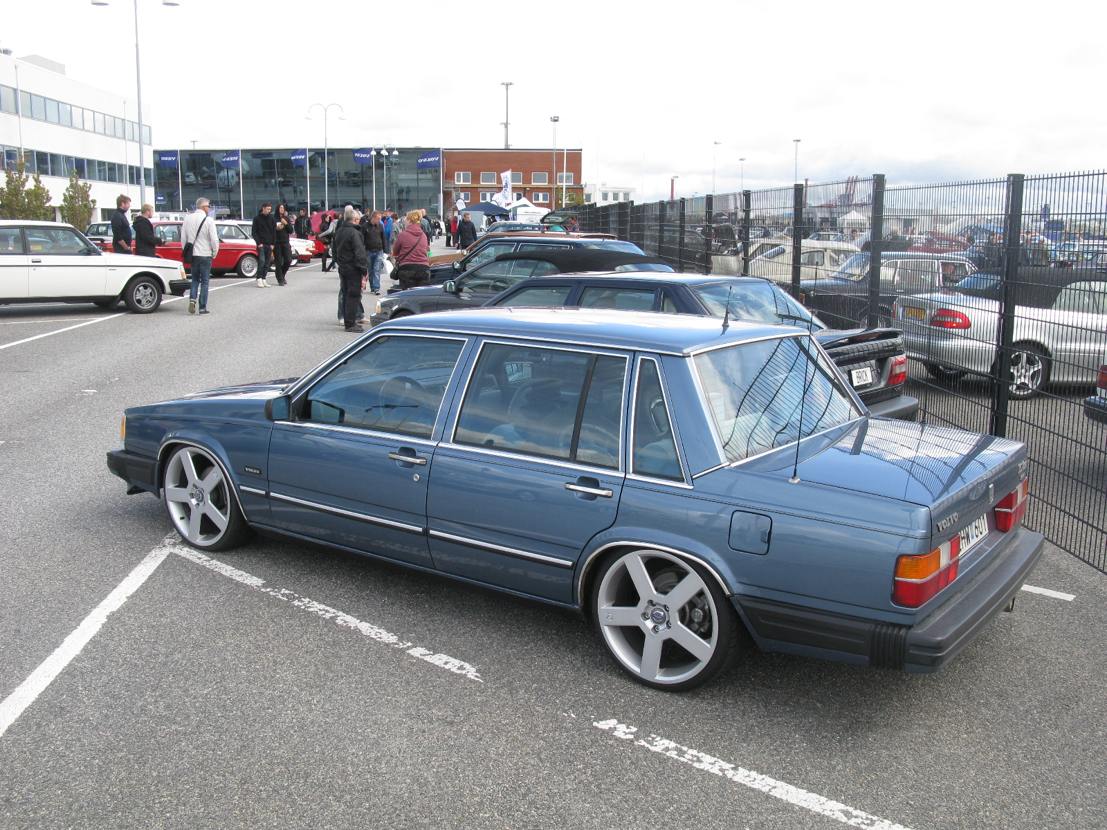 Volvo 760 Turbo